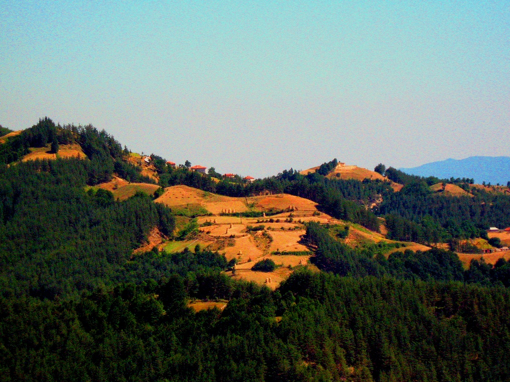 По коситба в Гърнати